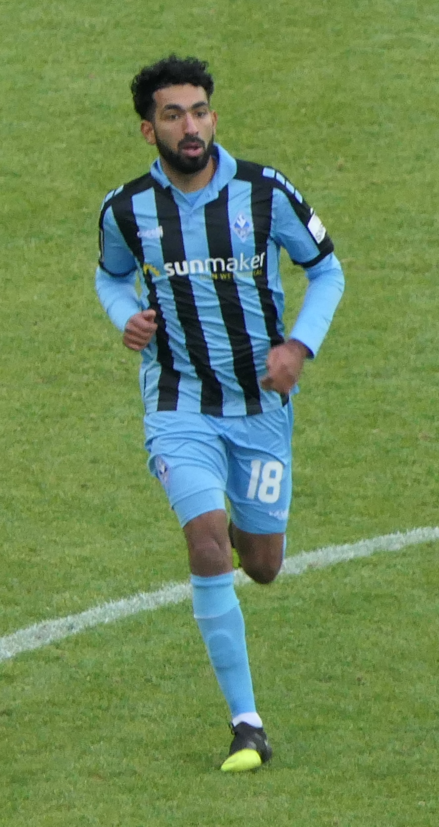 Der Fussballprofi Mohamed Gouaida im Trikot vom SV Waldhof Mannheim beim Heimspiel gegen Eintracht Braunschweig am 08.12.2019.